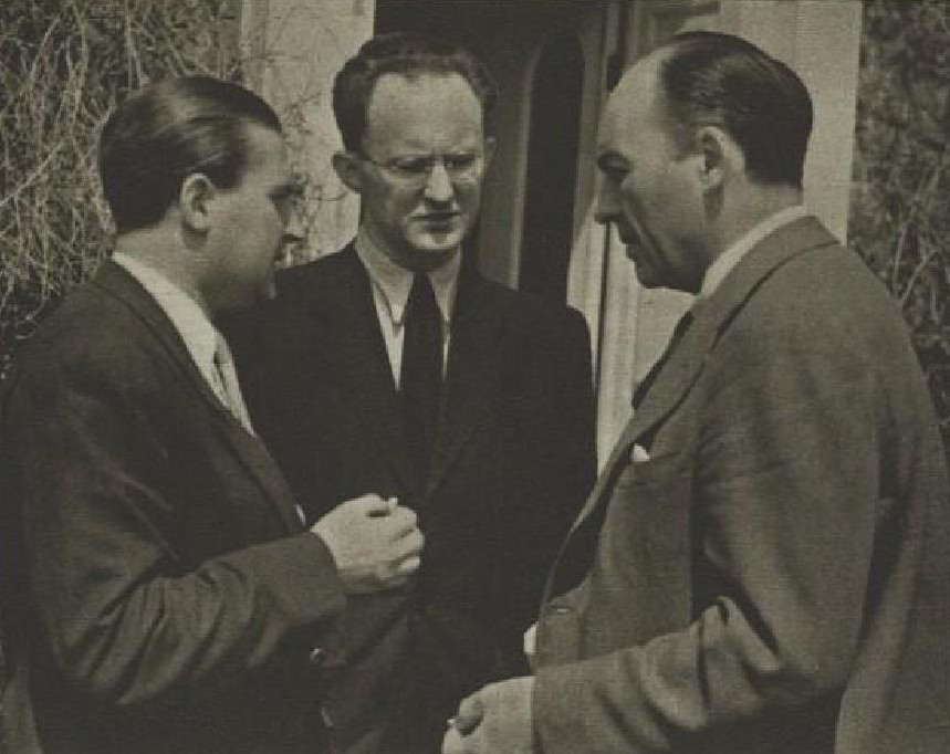 Čeněk Adamec (1916-1997), český sociolog